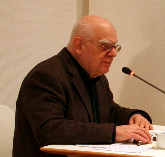 Schriftsteller Hans Joachim Schädlich bei einer Lesung im Ludwigshafener Ernst-Bloch-Zentrum